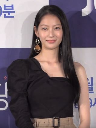 16일 오후 서울 영등포구 여의도 콘래드 호텔 파크볼룸에서 JTBC 새 월화드라마 ‘조선혼담공작소 꽃파당’ 제작발표회가 열렸다.